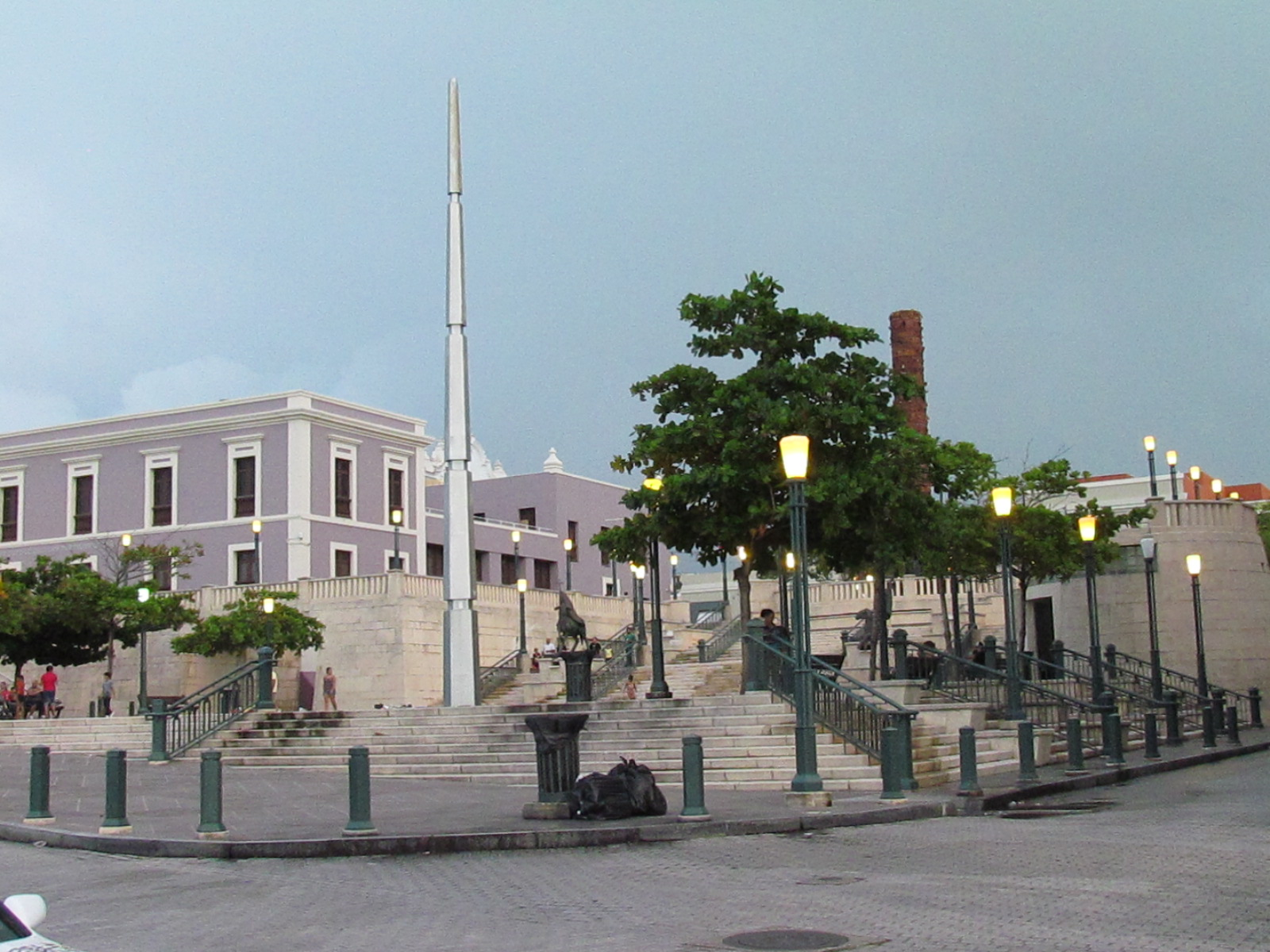 Plaza del Quinto Centenario - San Juan, Puerto Rico